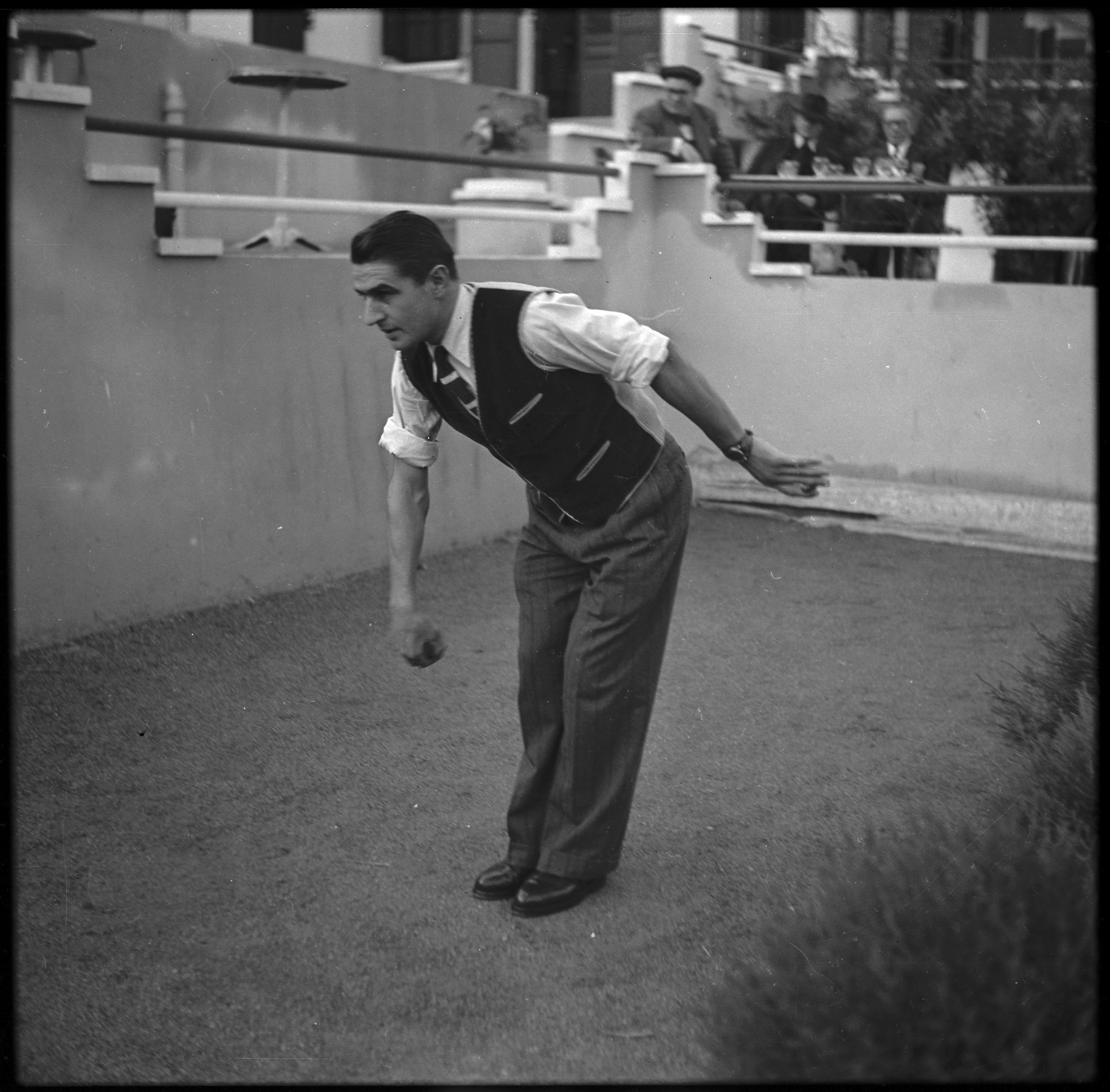 Boulodrome de Toulouse. 13-14 Juillet 1949. Vue du cycliste René Vietto prêt à lancer une boule de pétanque ; trois hommes assis à une terrasse au second plan l'observent.